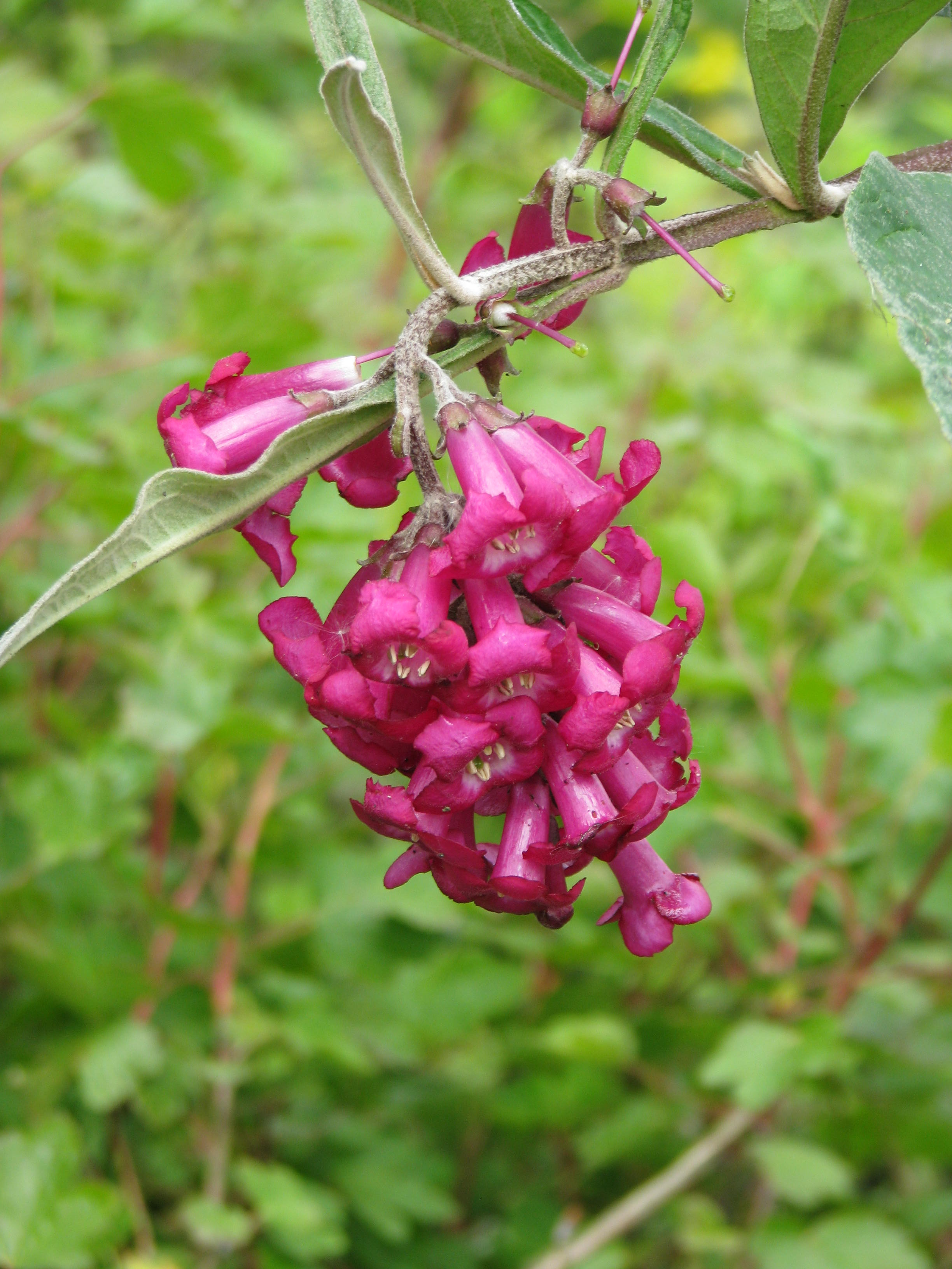 Buddleja colvillei Kewensis